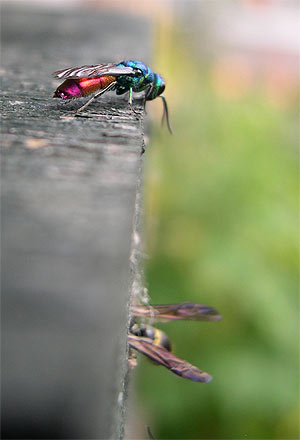 Goudwesp op houtblok foto Huib Koel